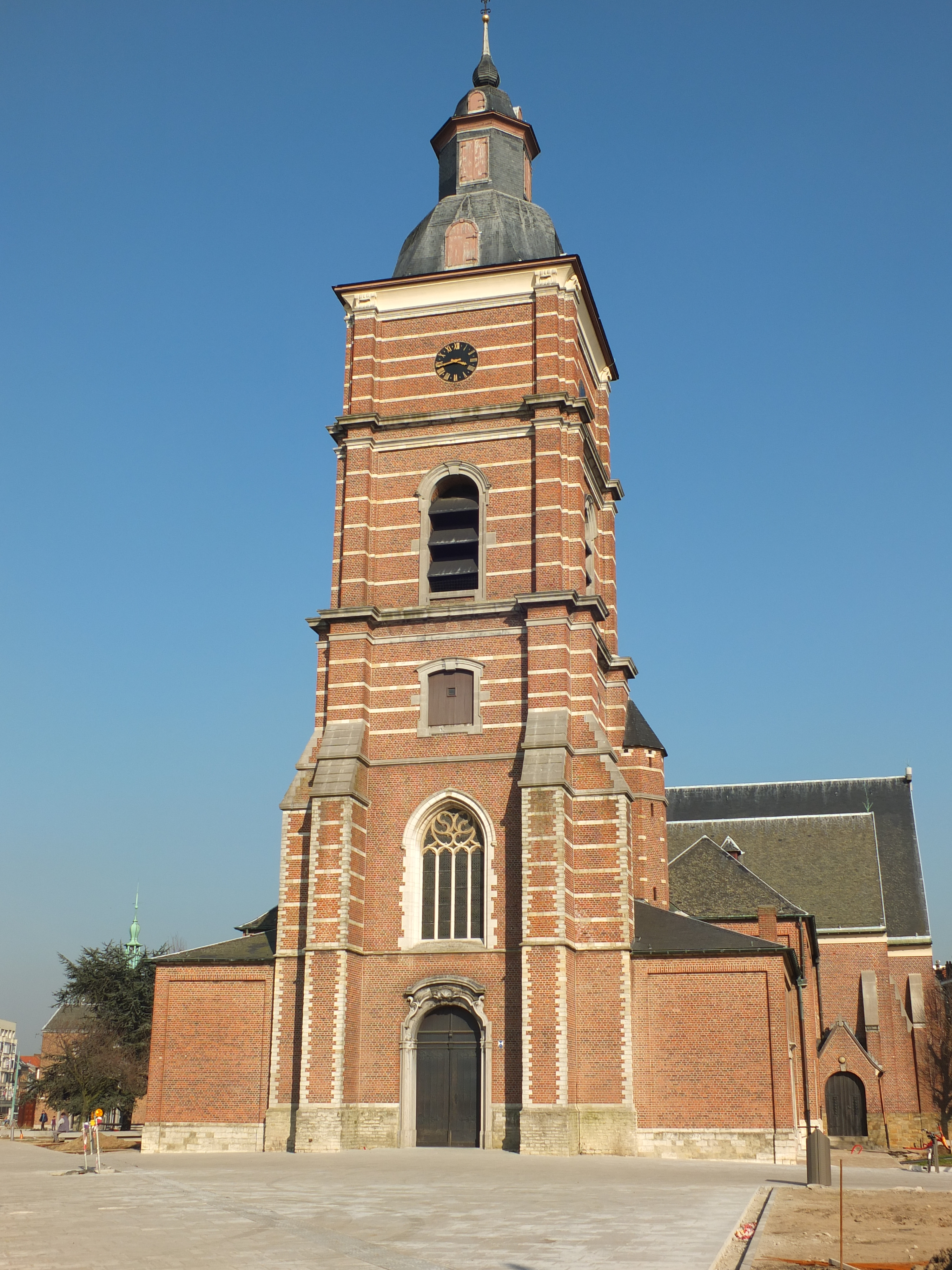 Antwerpen, district Merksem. Sint-Bartholomeuskerk, begin 17de eeuw. Vergroot (dwarsbeuk en koor) in 1937-1938, o.l.v. Jef Huygh. Ze werd zwaar beschadigd tijdens WO II, o.m. volledige verwoesting van westtoren, Er was echter wederopbouw in de periode 1947-1951. Vgl. verder Vlaams Instituut voor Bouwkundig Erfgoed.